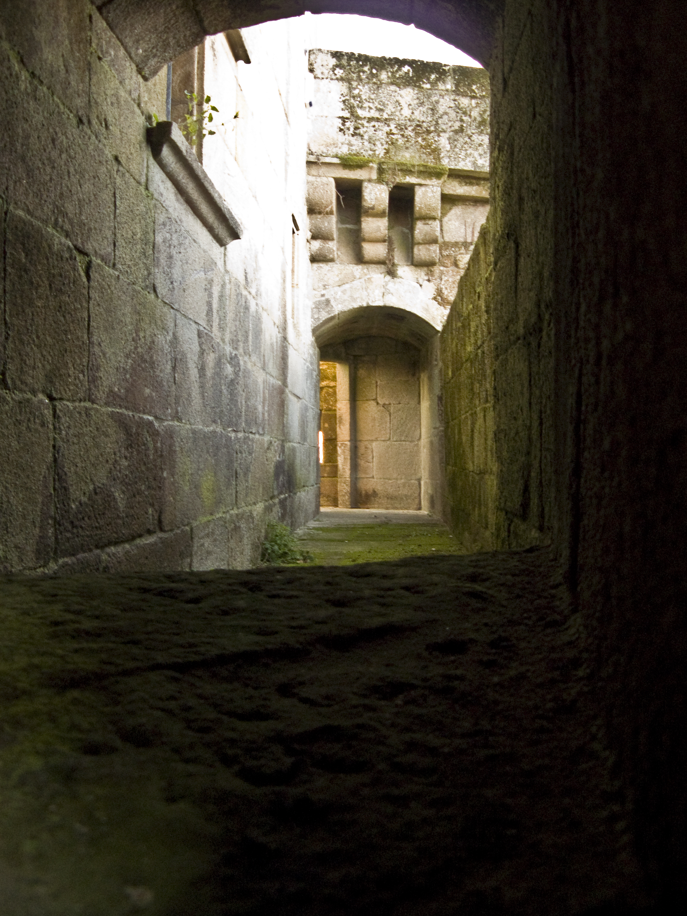 Ronda de garda do Castelo de Vilamarín